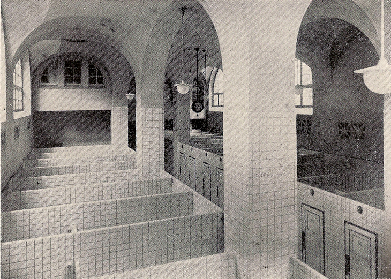 Landesbad, Männerbadehalle mit 37 Einzelzellen (1923)